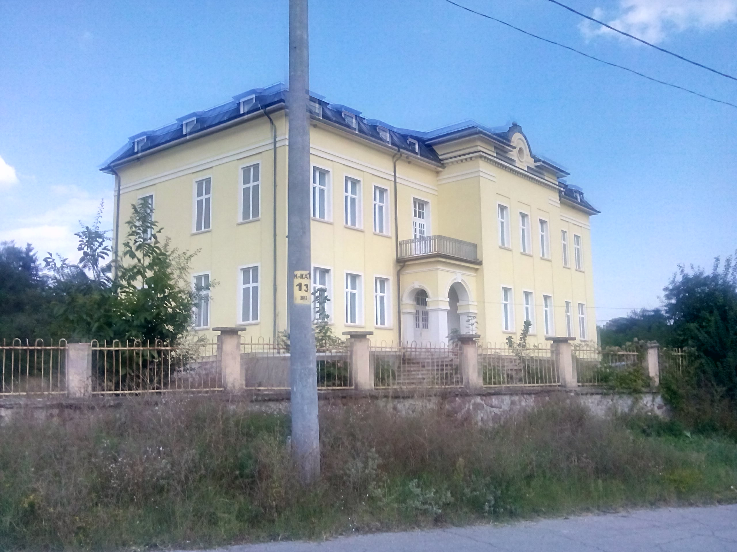 Училището